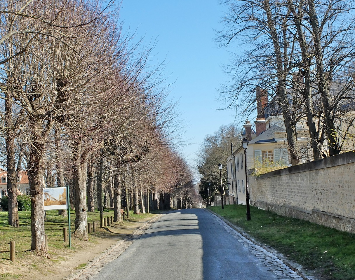 Le Chemin de la Machine 2013